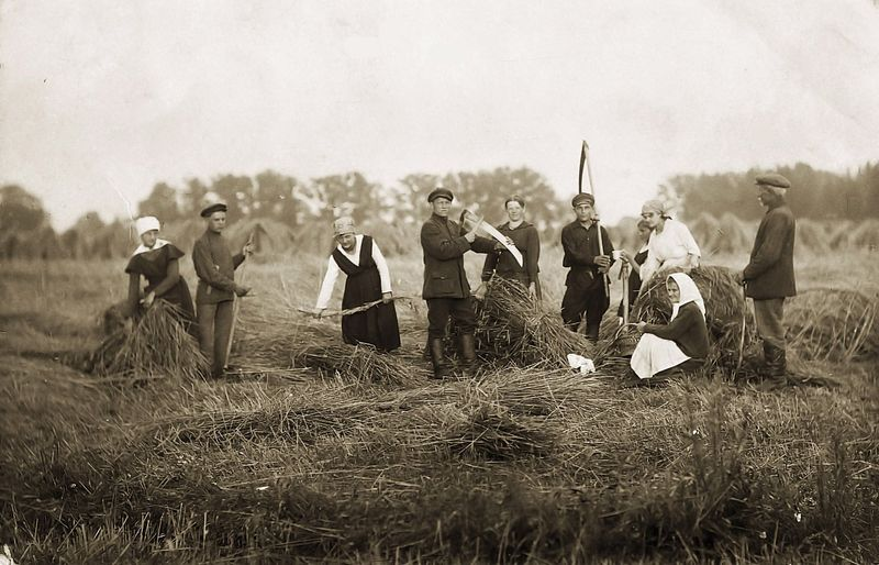 Vladas Ingelevičius su šeima (pirma iš kairės Kazė). Kartanai, 1922 metų liepos 1